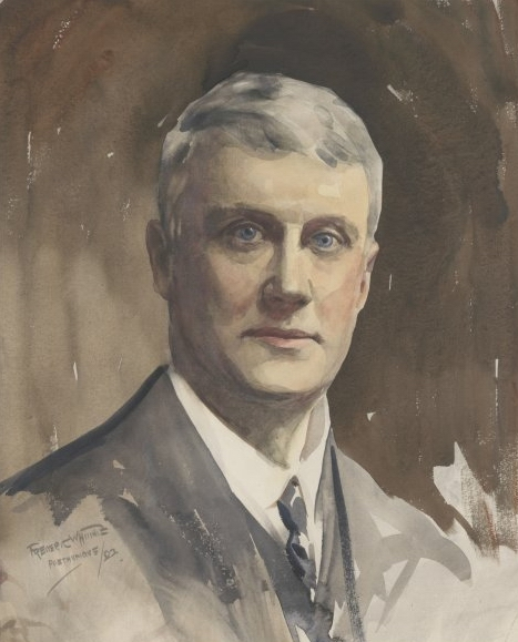 George Ernest "Chinese" Morrison